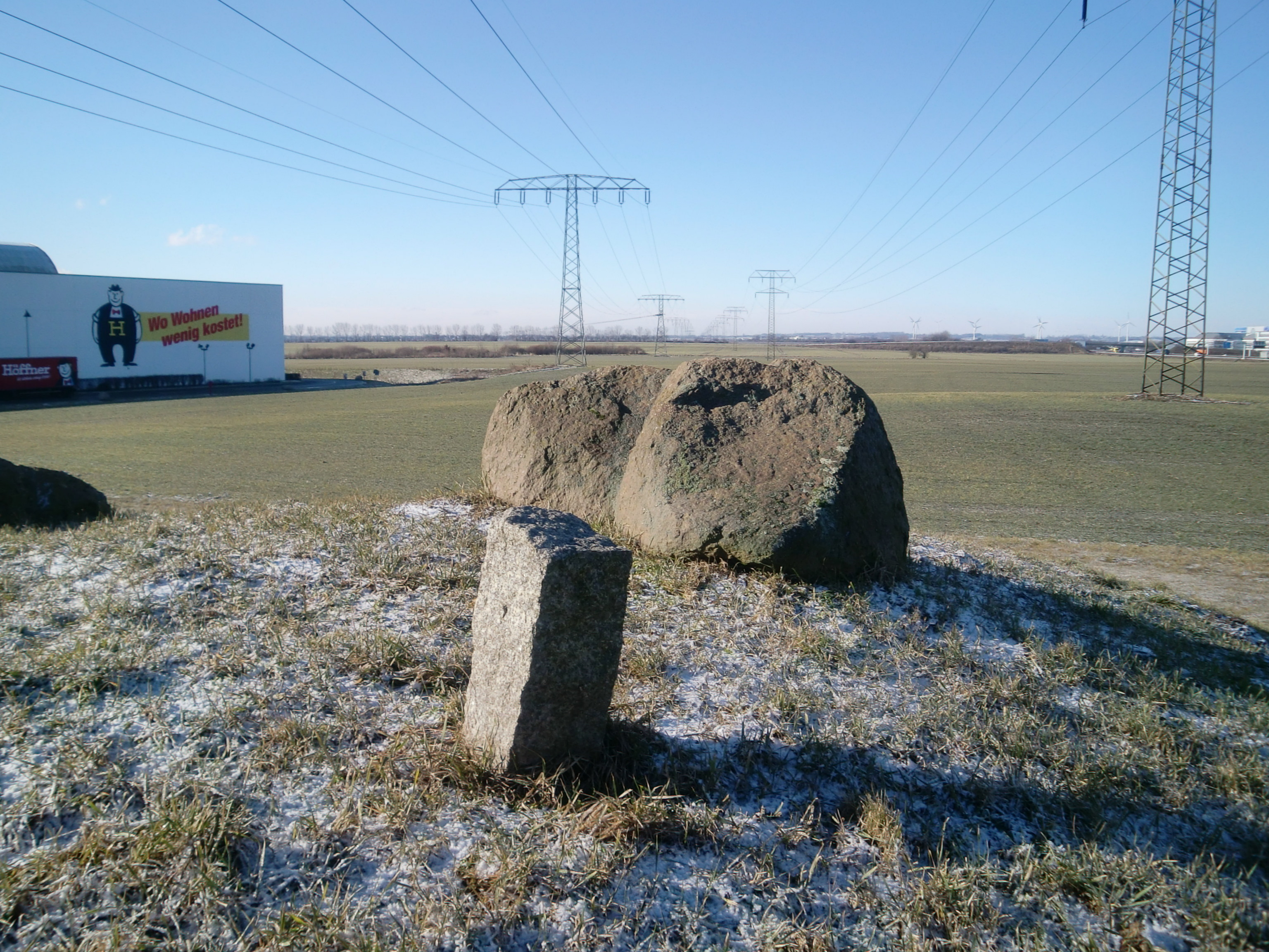 Blick vom Pfahlberg, Pfahl auf dem Pfahlberg, nördlich von Magdeburg